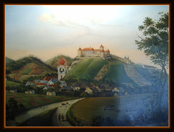 Wörth an der Donau vor 1841